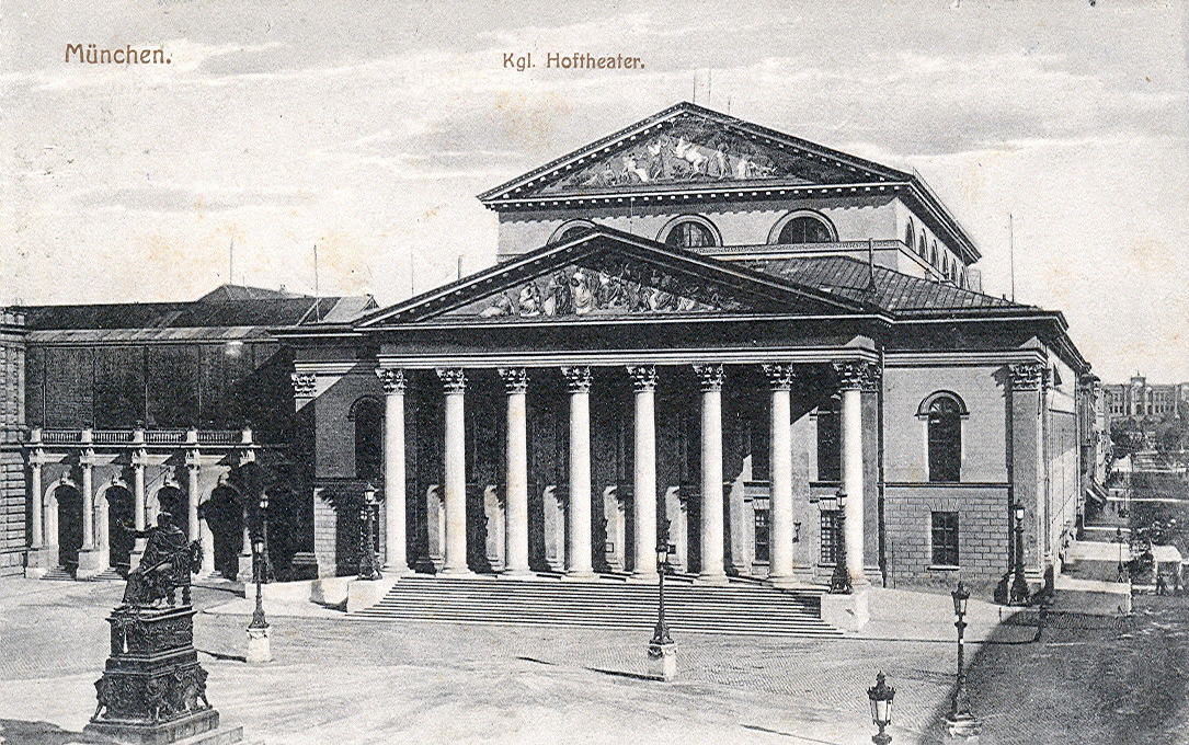 Postkarte, datiert 28.6.1918. Beschriftung: "München - Königliches Hoftheater."